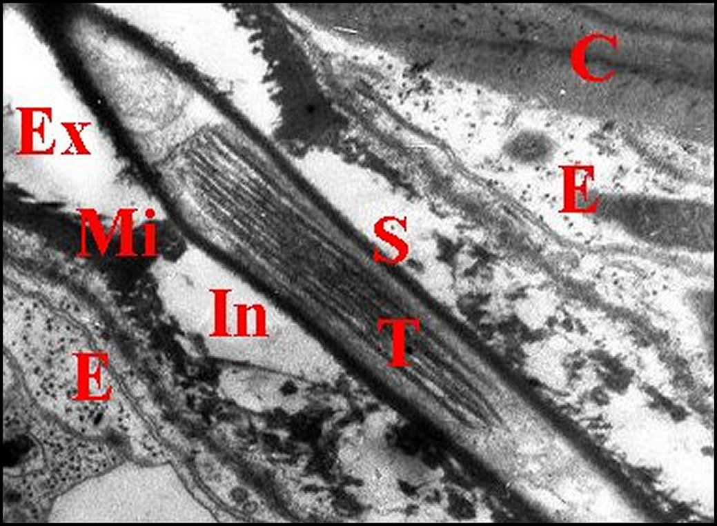 Corps tubulaire en coupe longitudinale avec ses microtubules et ses enveloppes vu au microscope électronique à transmission